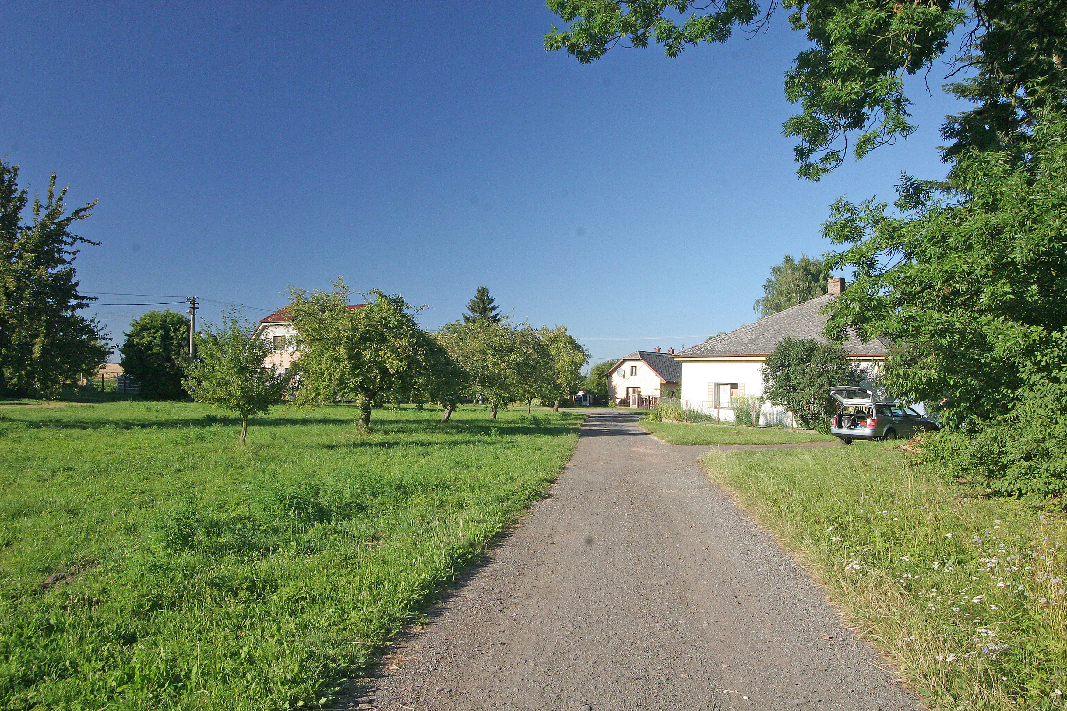 Křičov náves